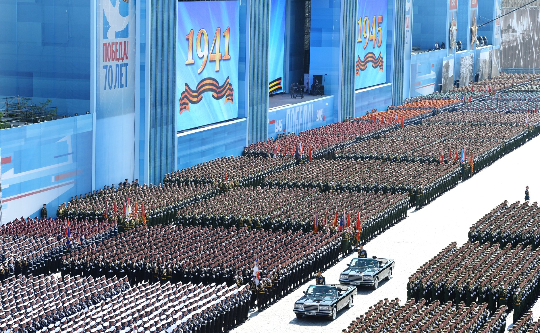 Военный парад в ознаменование 70-й годовщины Победы в Великой Отечественной войне 1941–1945 годов.